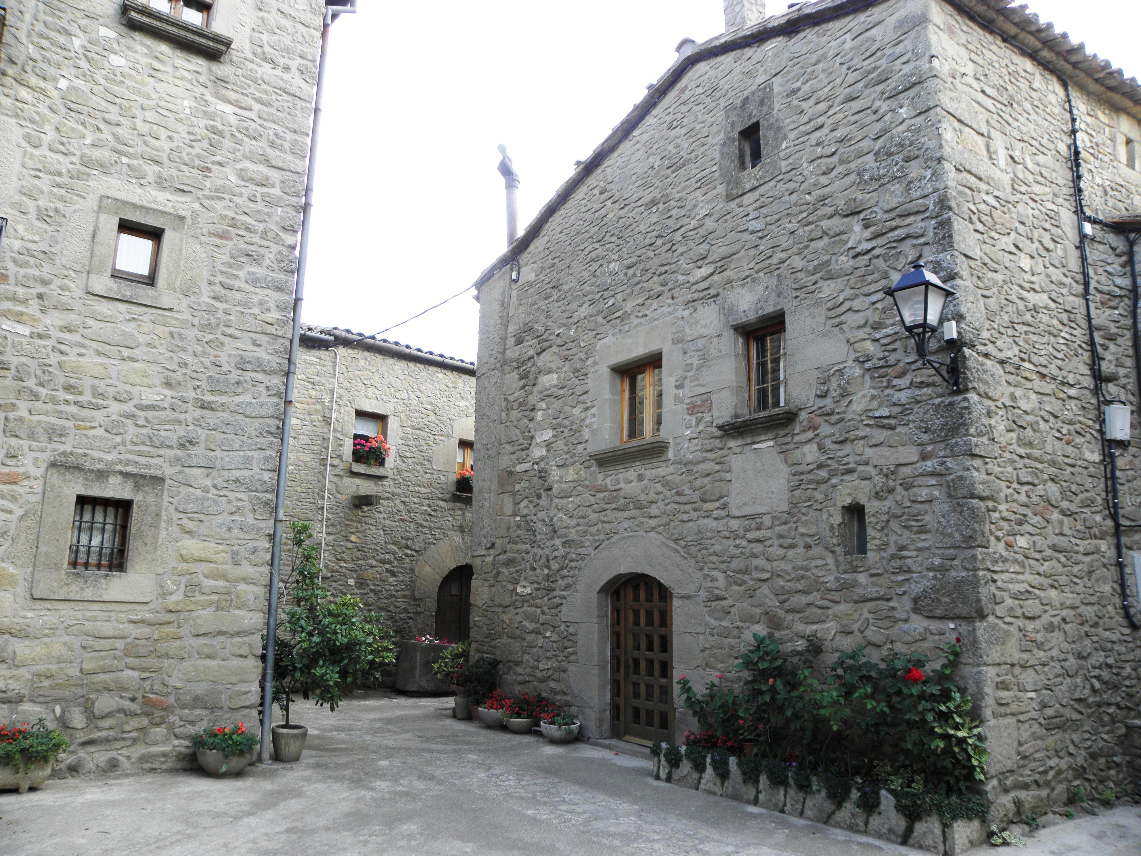 La plaça major de Prades de la Molsosa (La Molsosa, Solsonès).